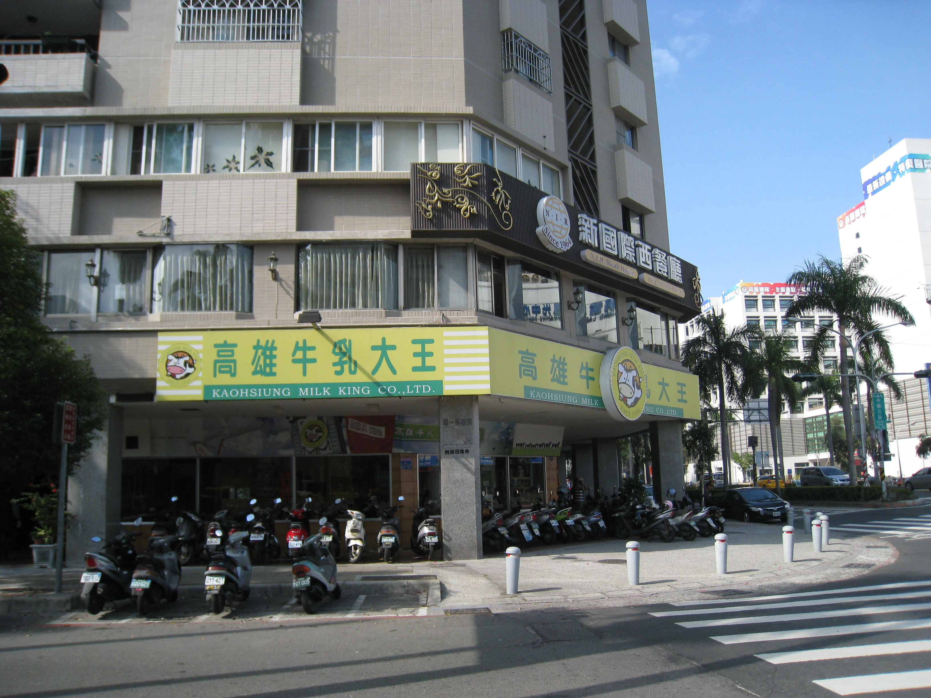 中文（台灣）: 高雄牛乳大王中華總店